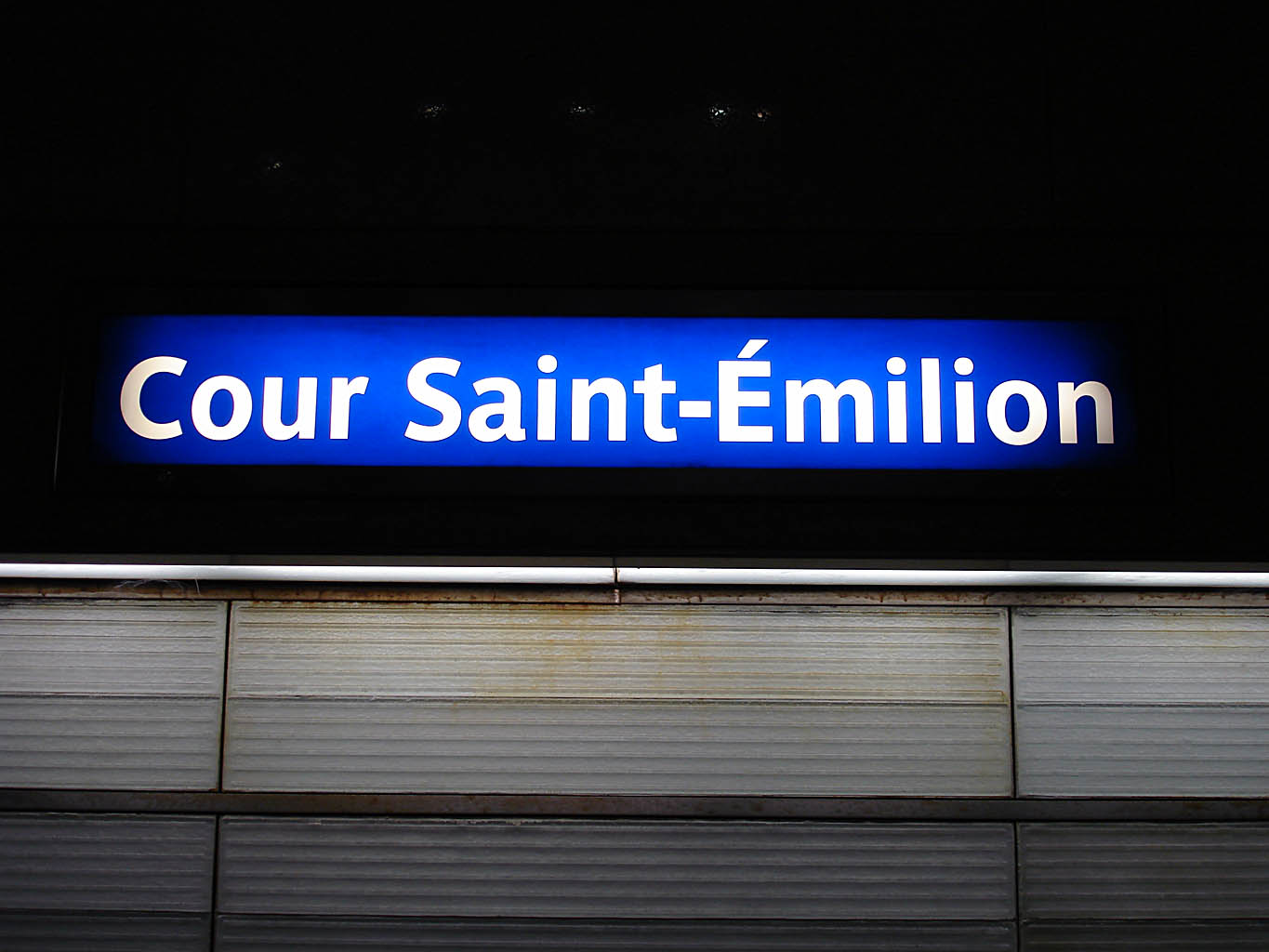 Station Cour Saint-Émilion de la ligne 14 du métro de Paris, France.